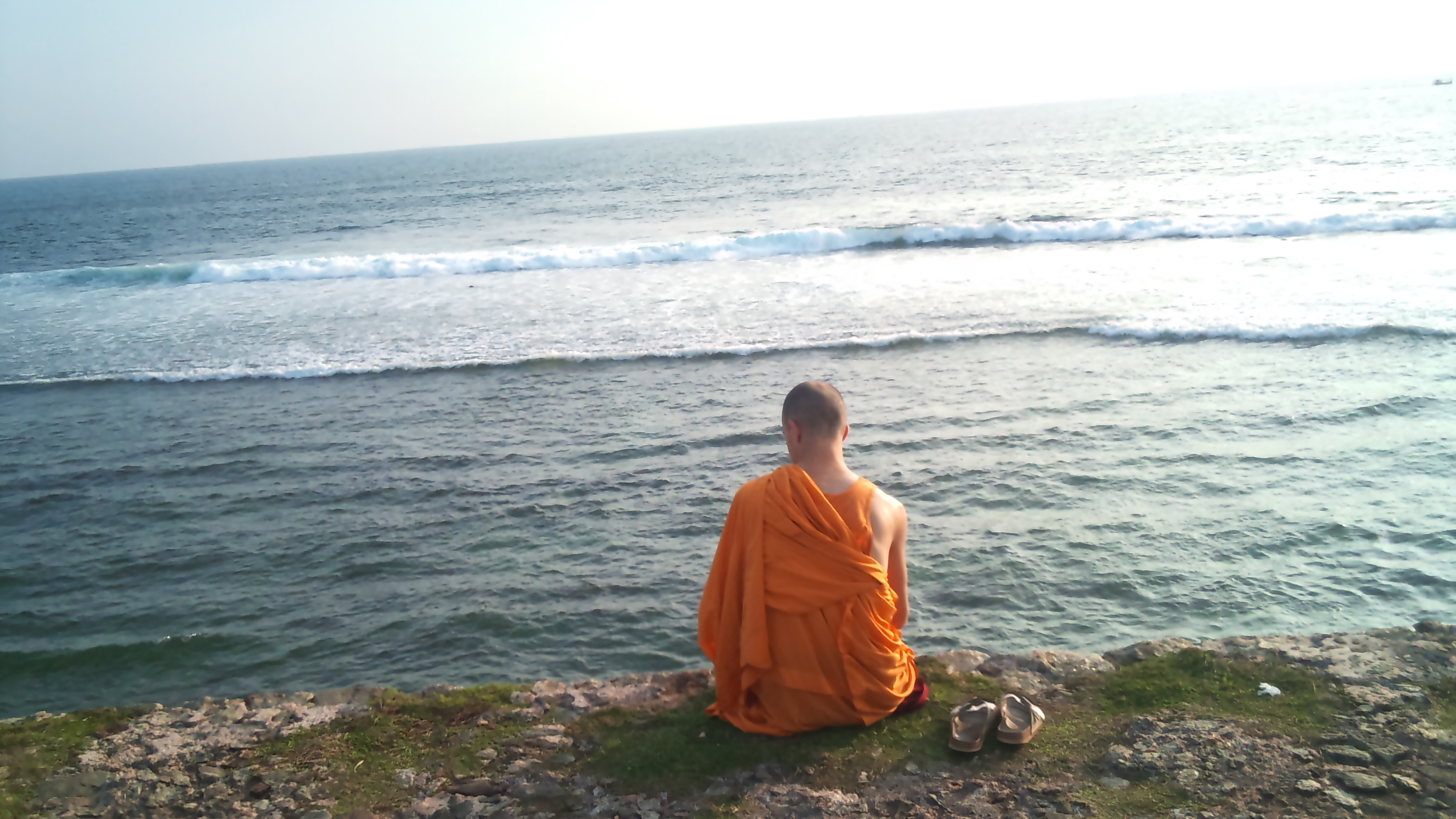 Le bonze - La Contemplation - la Relativité